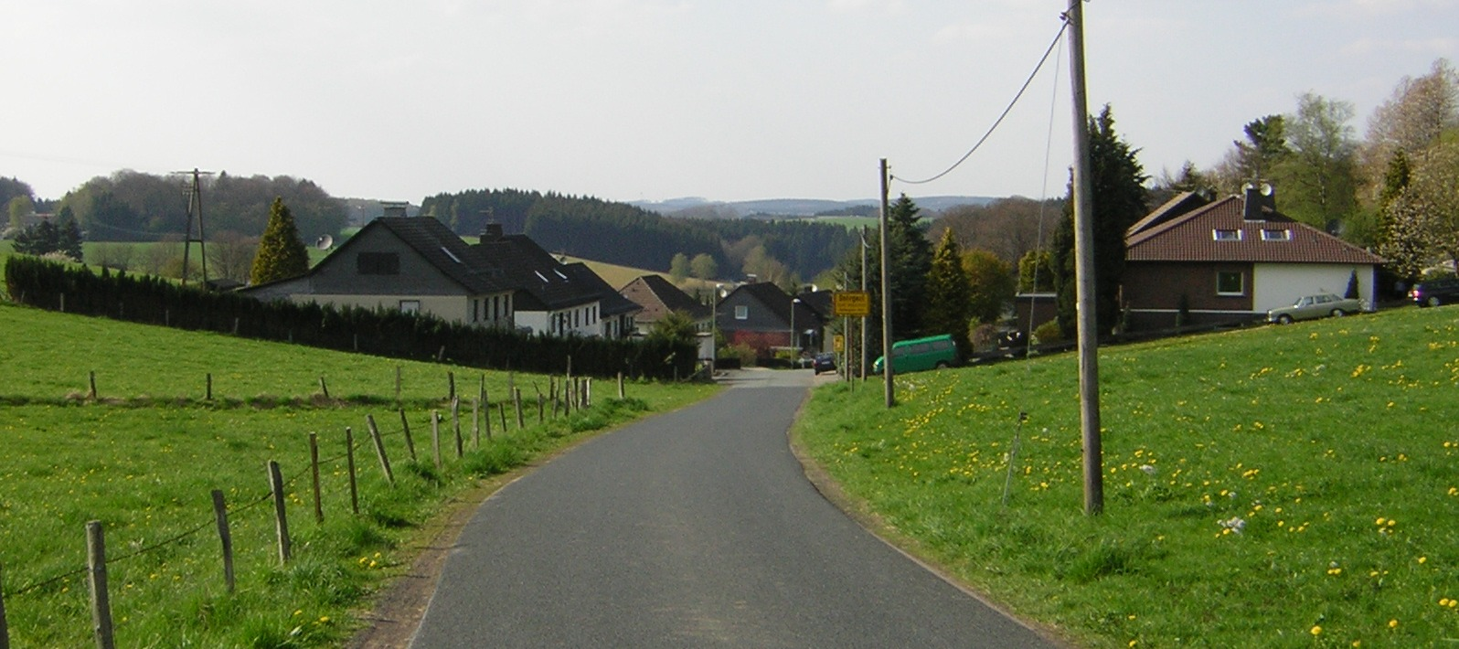 Dohrgaul in Wipperfürth Aufgenommen: 2005 mit Nikon Coolpix 2200